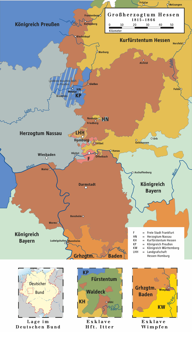 Karte des Großherzogtums Hessen 1816–1866/Map of Grand Duchy of Hesse 1816–1866